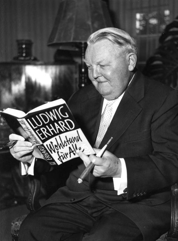 Herr Dr. Wehrenkamp (Ukon Verlag) überreicht Dr. Ludwig Erhard sein Buch "Wohlstand für Alle"